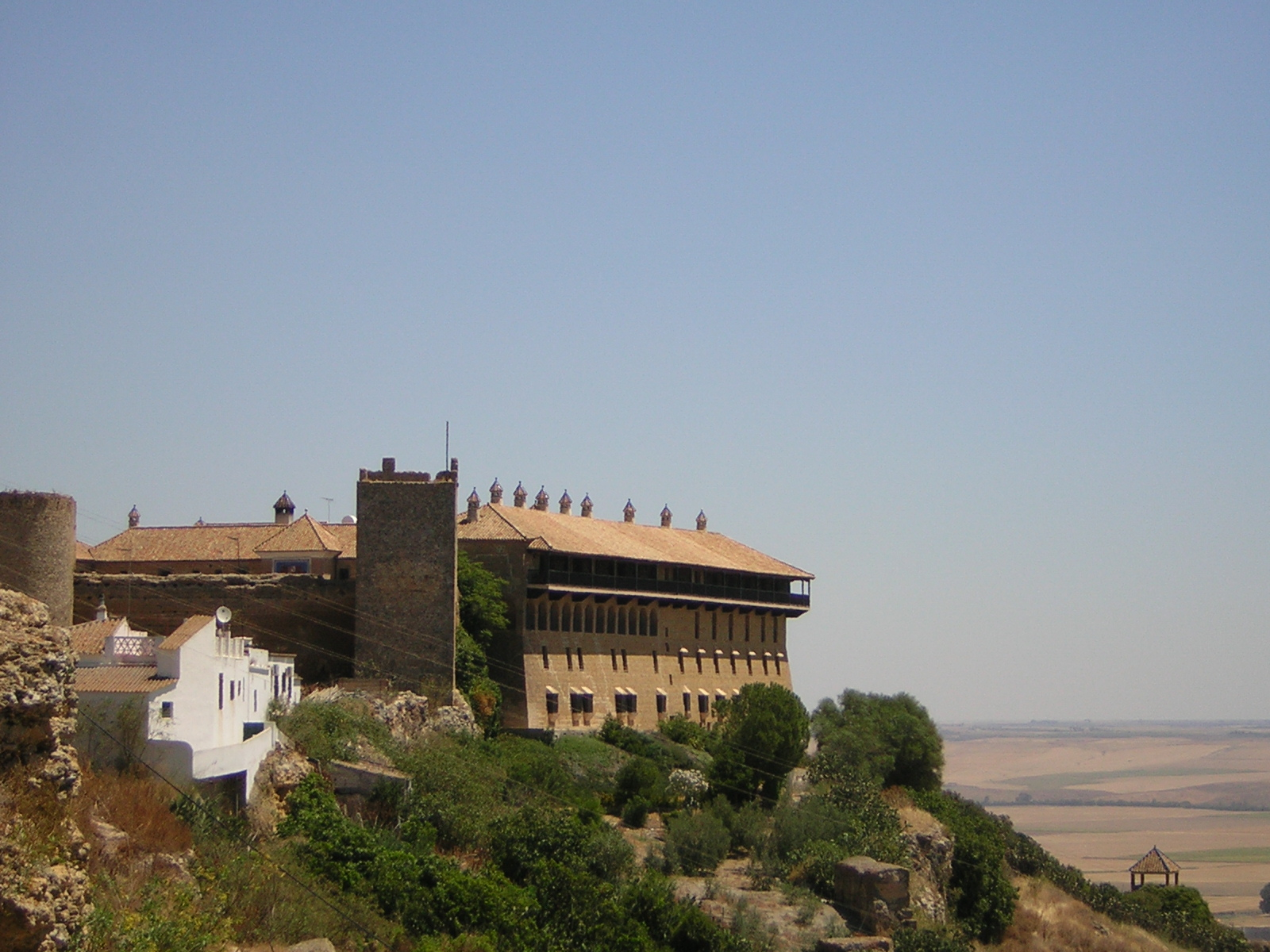 Parador de Carmona